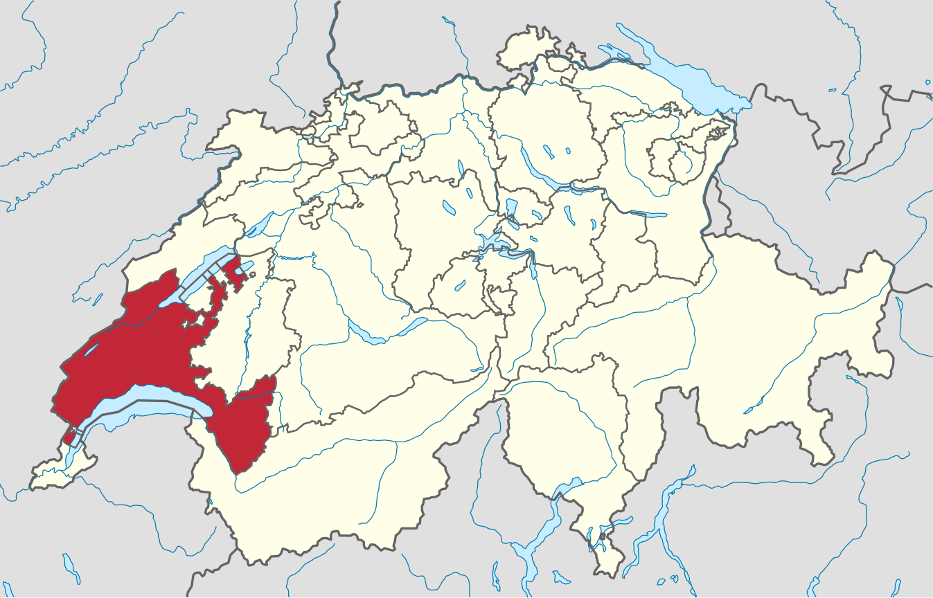 Lage vom Kanton Waadt in der Schweiz.